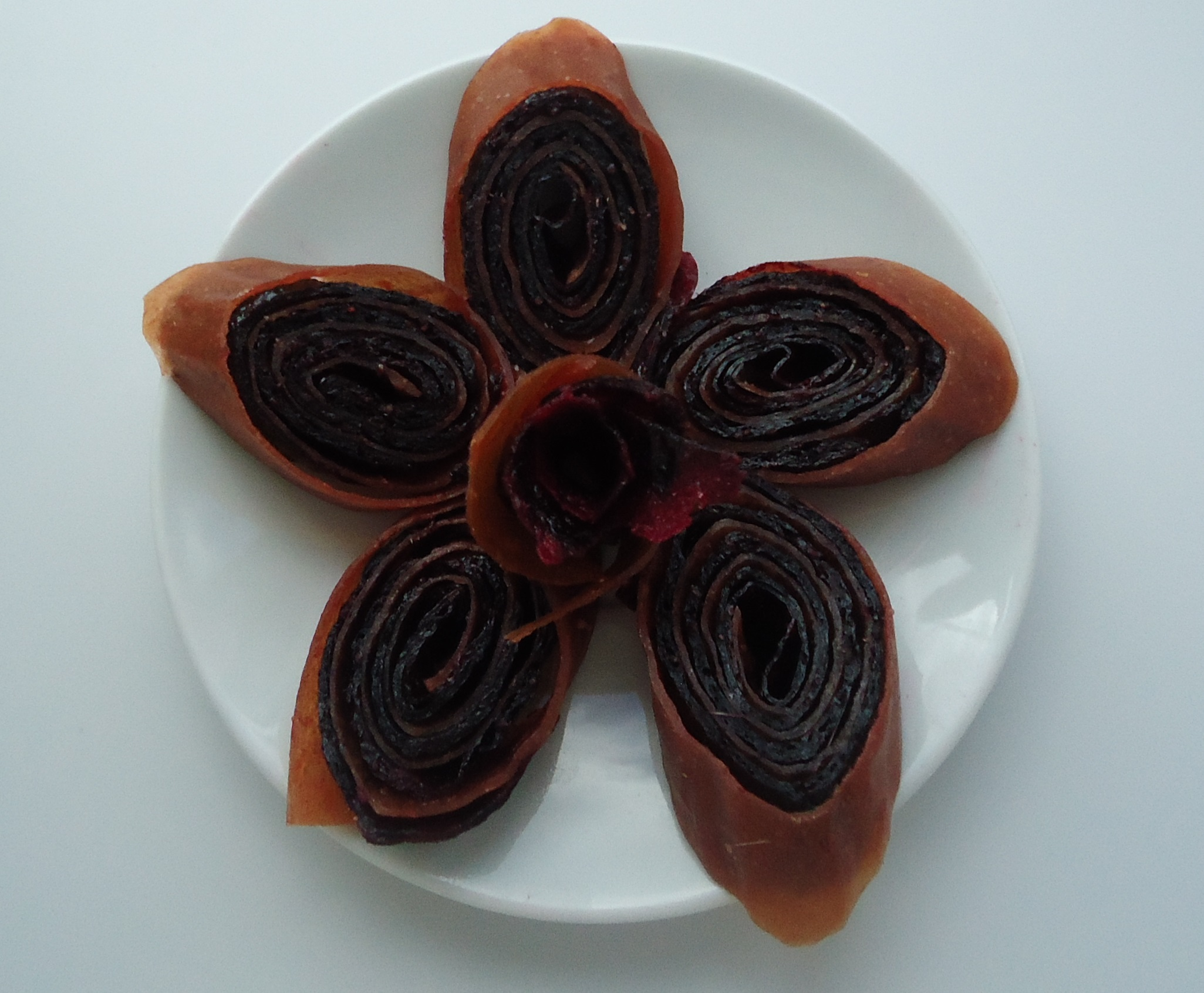 Башкирское национальное блюдо - ҡаҡ - пастила из яблок и смородины